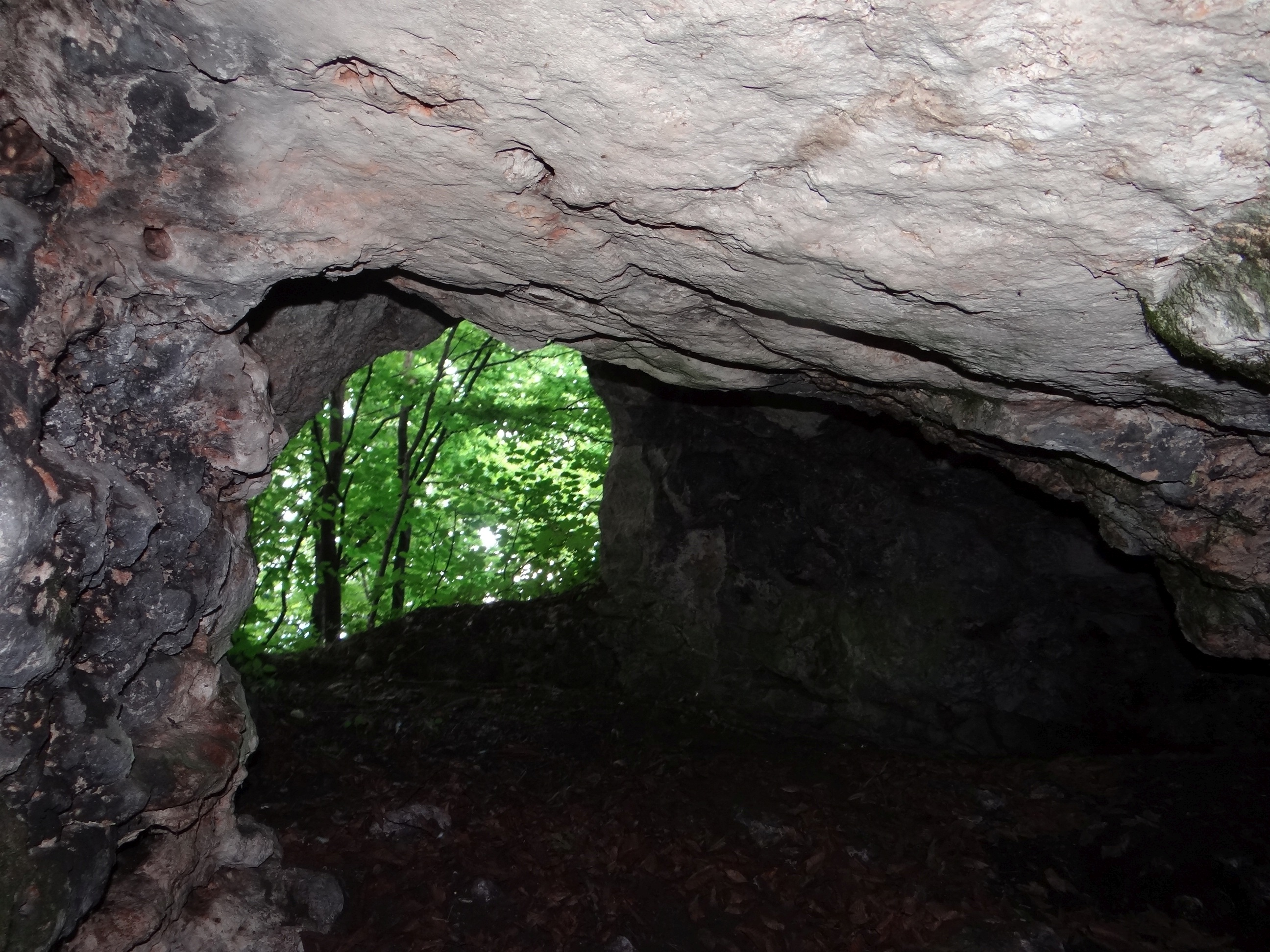 Schronisko w Starym Łomiku w grupie Pomorzańskich Skał